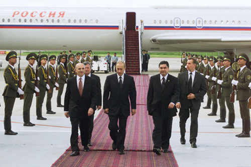 АШХАБАД. Церемония встречи в аэропорту.